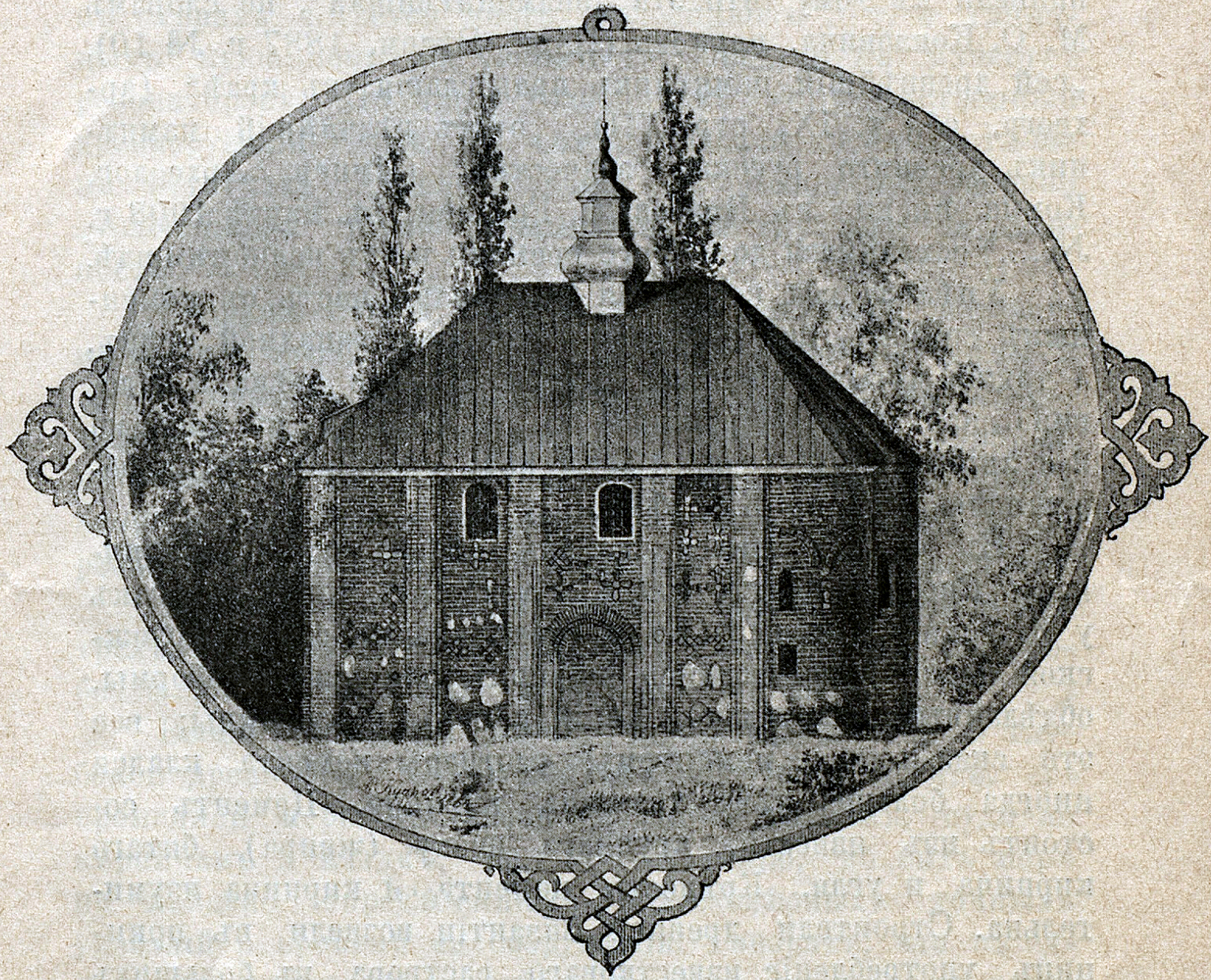 Беларуская (тарашкевіца): Горадня (Horadnia), Каложа (Kałoža). Царква Сьвятых Барыса і Глеба